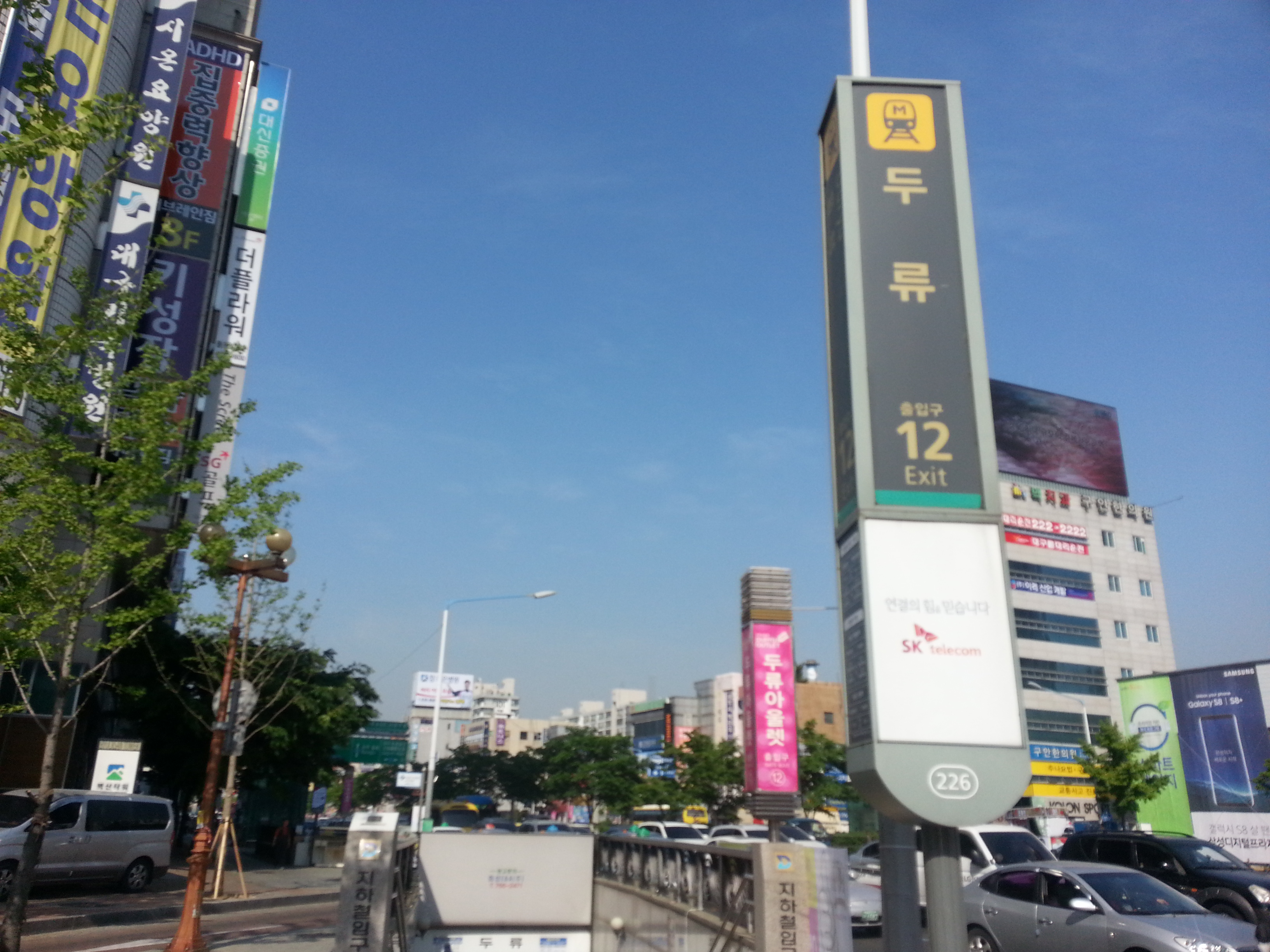 대구 도시철도 2호선 두류역 12번 출구